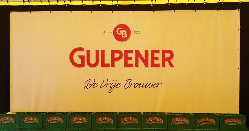 Tijdens de jaarlijkse hopoogst van de Gulpener Bierbrouwerij werd het nieuwe beeldmerk onthuld door Algemeen Directeur Jan-Paul Rutten en 'Hopkoningin' Petra Mullenders